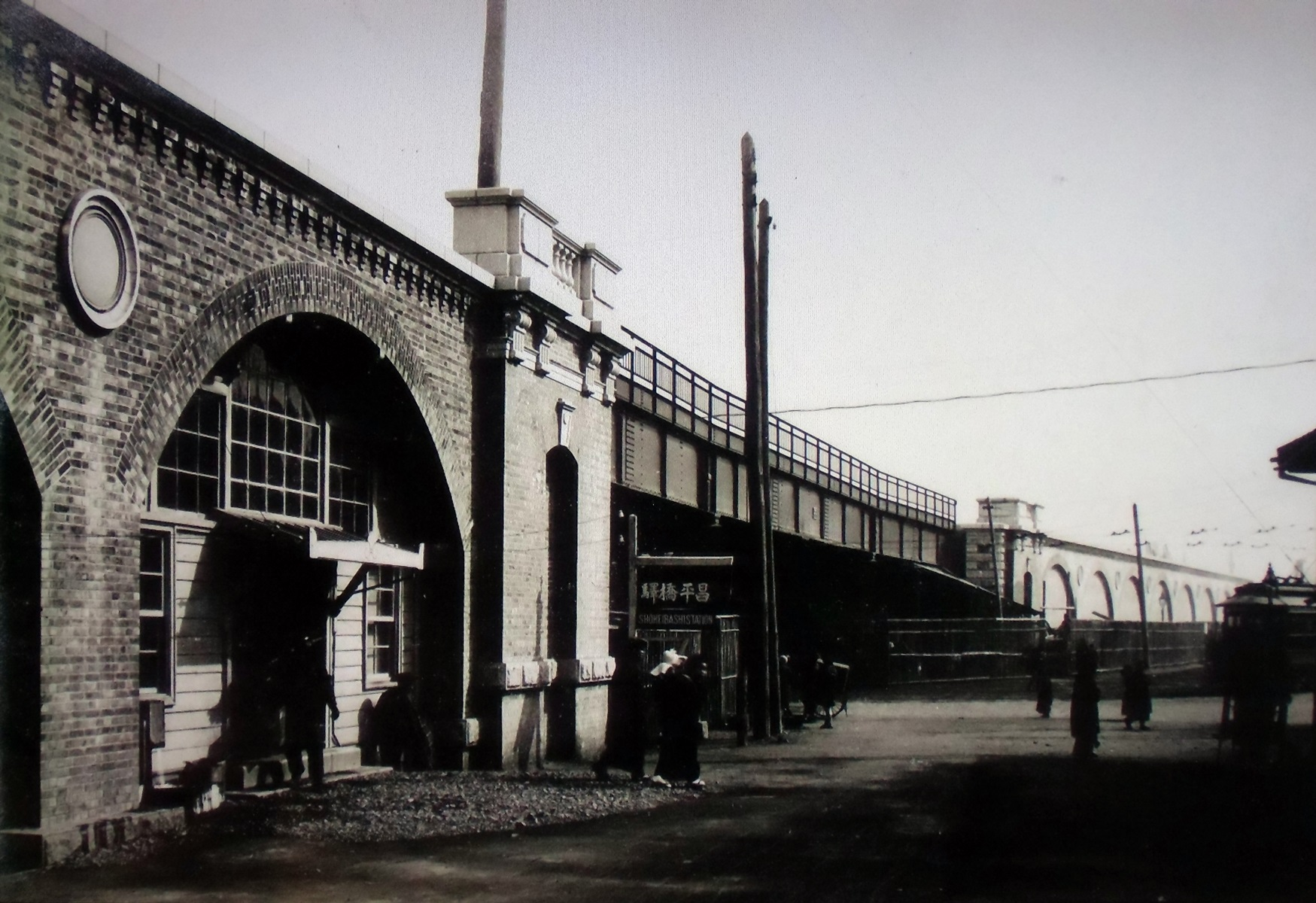 昌平橋駅（昌平橋仮停車場）入口